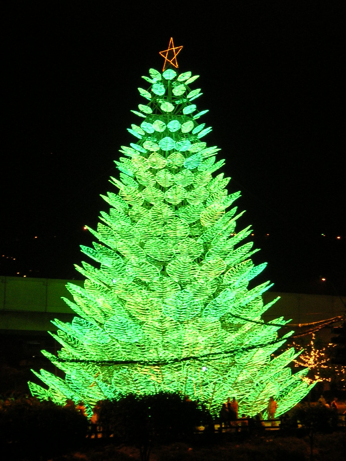 Alumbrados Navideños sobre el Río Medellín 2006, Medellín, Colombia